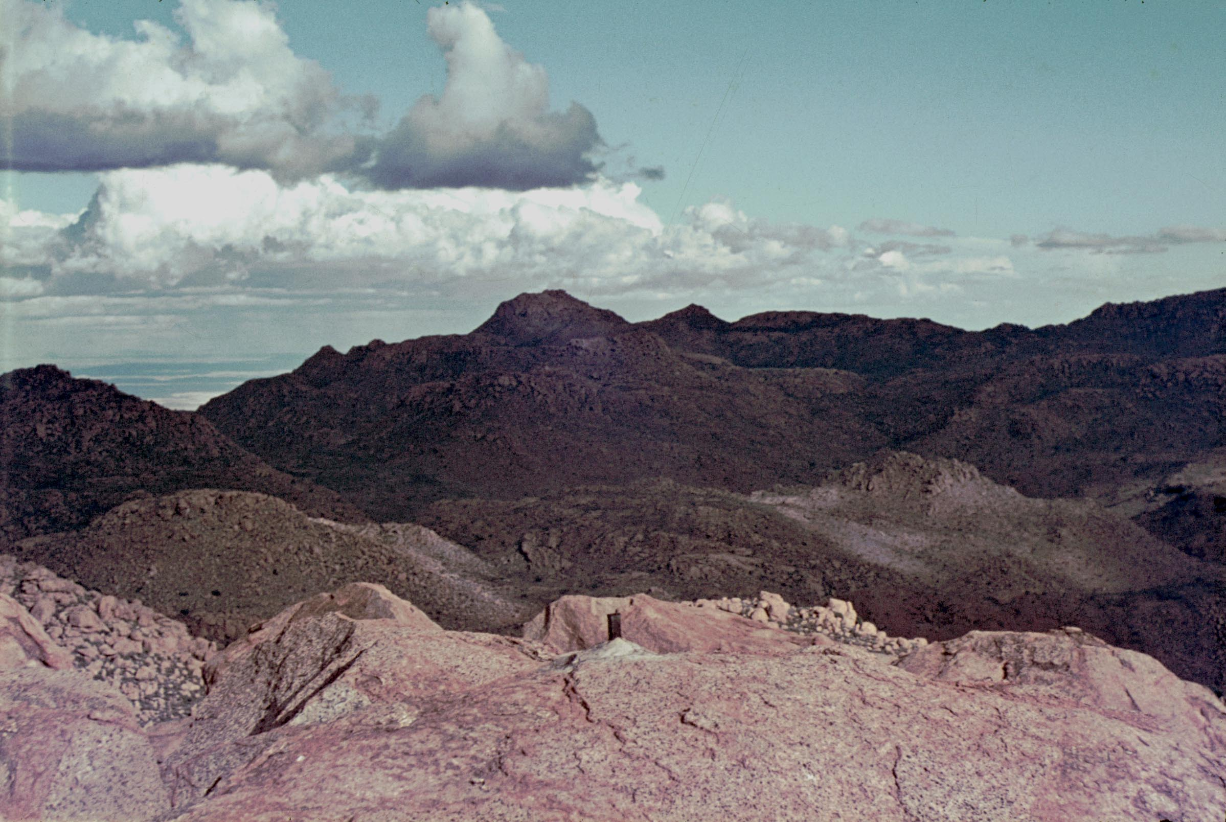 Die einzementierte Eisenstange aus dem Jahr 1914 (Claus Burfeindt) war noch vorhanden. Im Hintergrund ist der Königstein zu sehen.